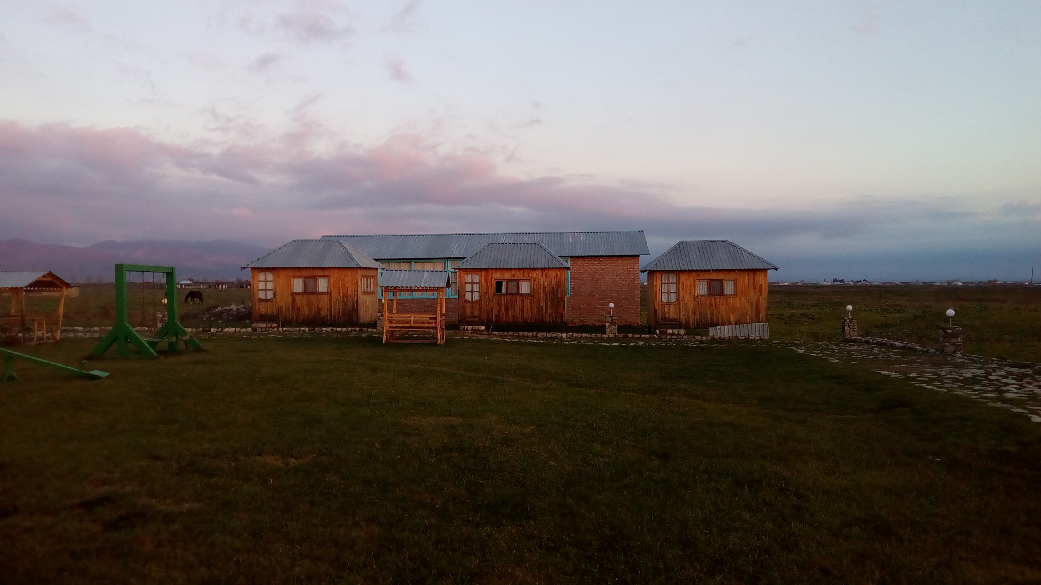 Orta əsr Ağsu şəhəri Arxeoloji Turizm Kompleksi